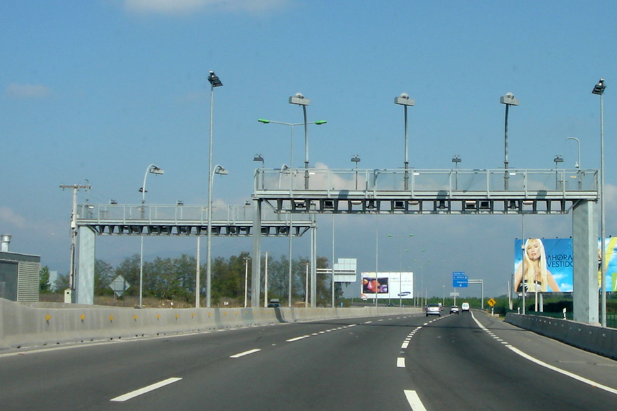 Portico con los instrumentos de telepeaje y cameras de video de control. Autopista Costanera Norte, Santiago de Chile.